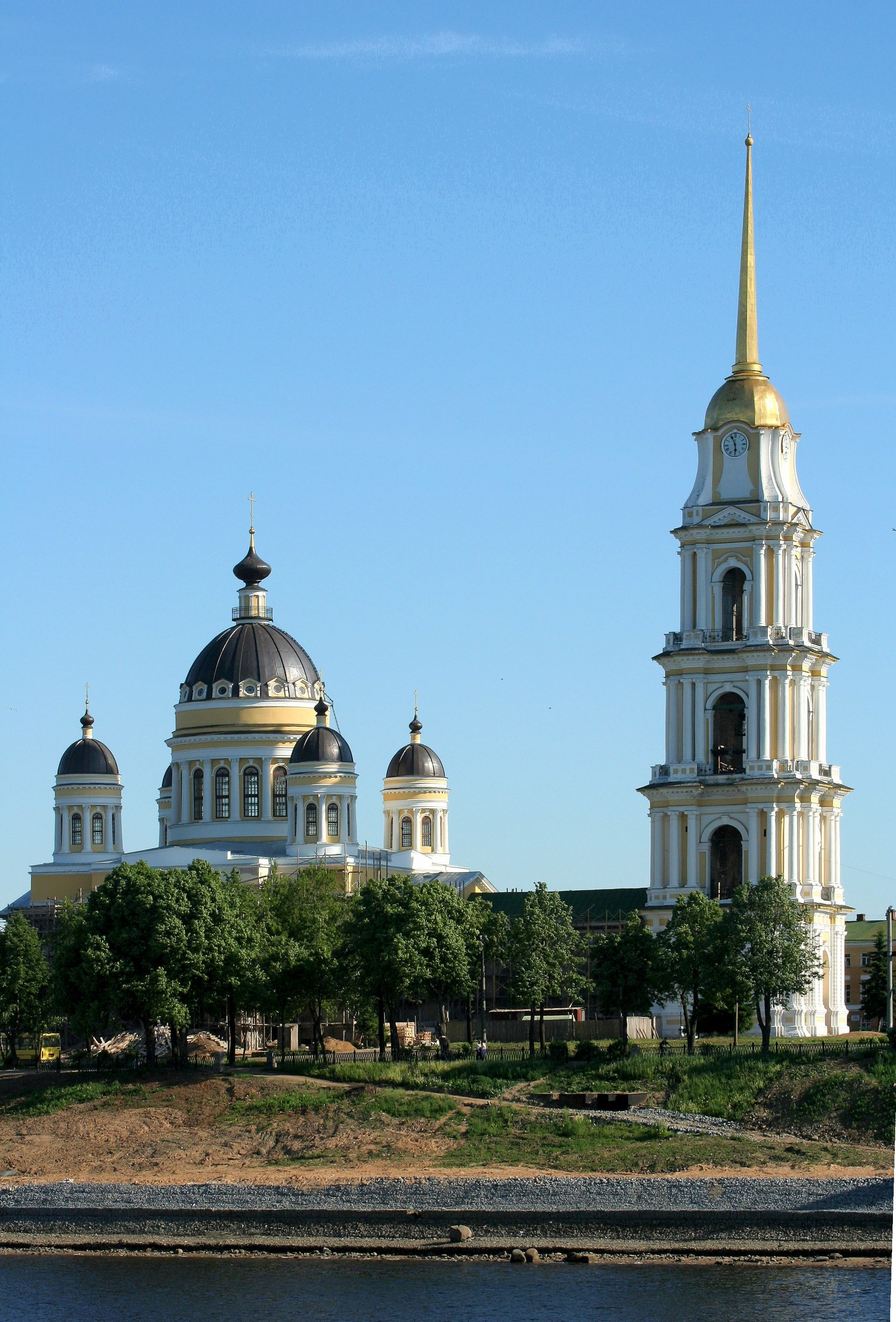 Rybinsk